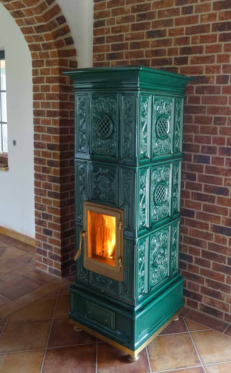 Keramické kachle od La Castellamonte